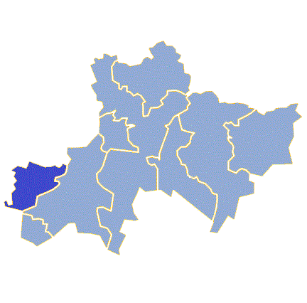 Powiat żagański - Gmina Wymiarki